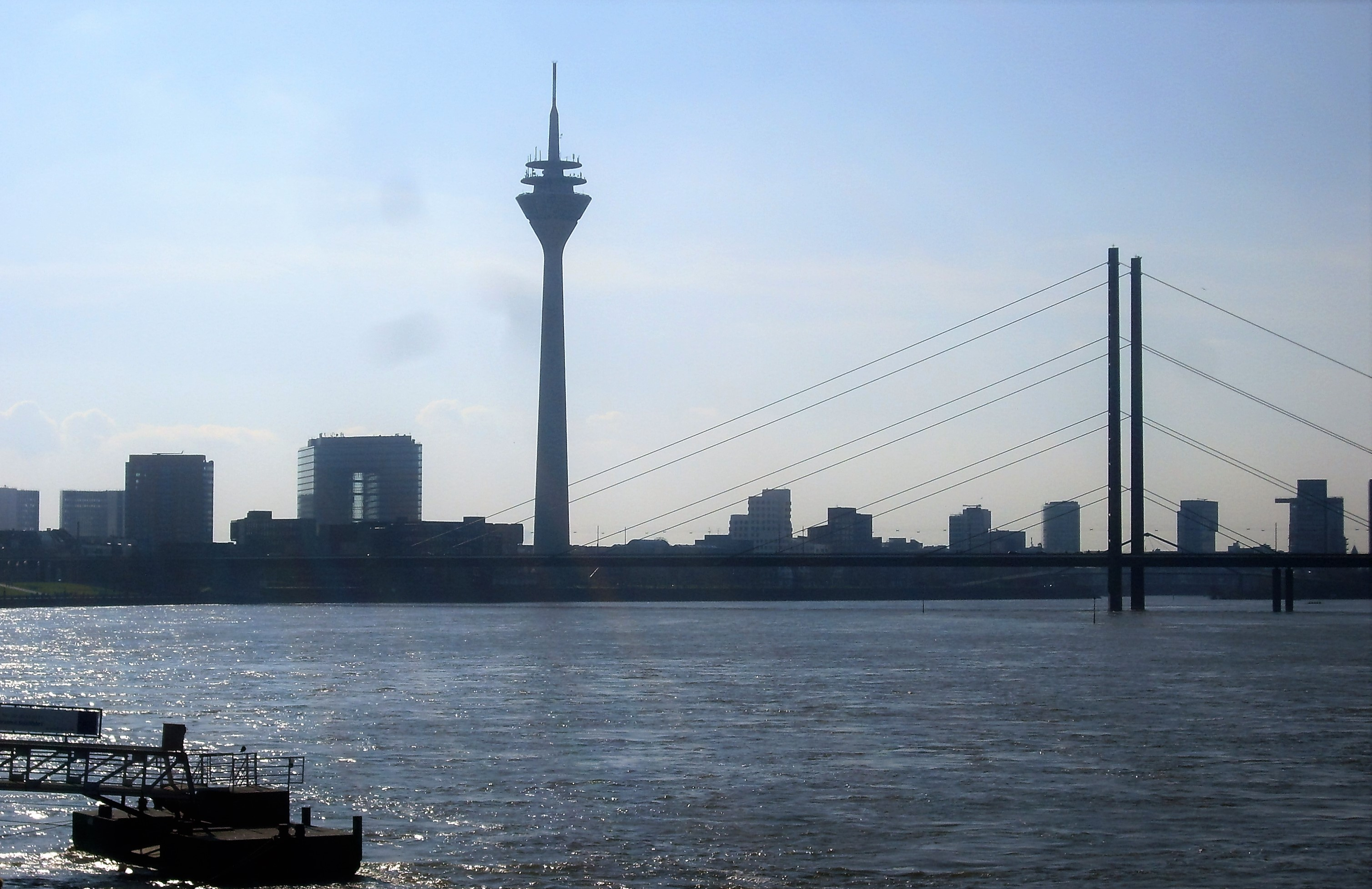 Architectuur in Düsseldorf